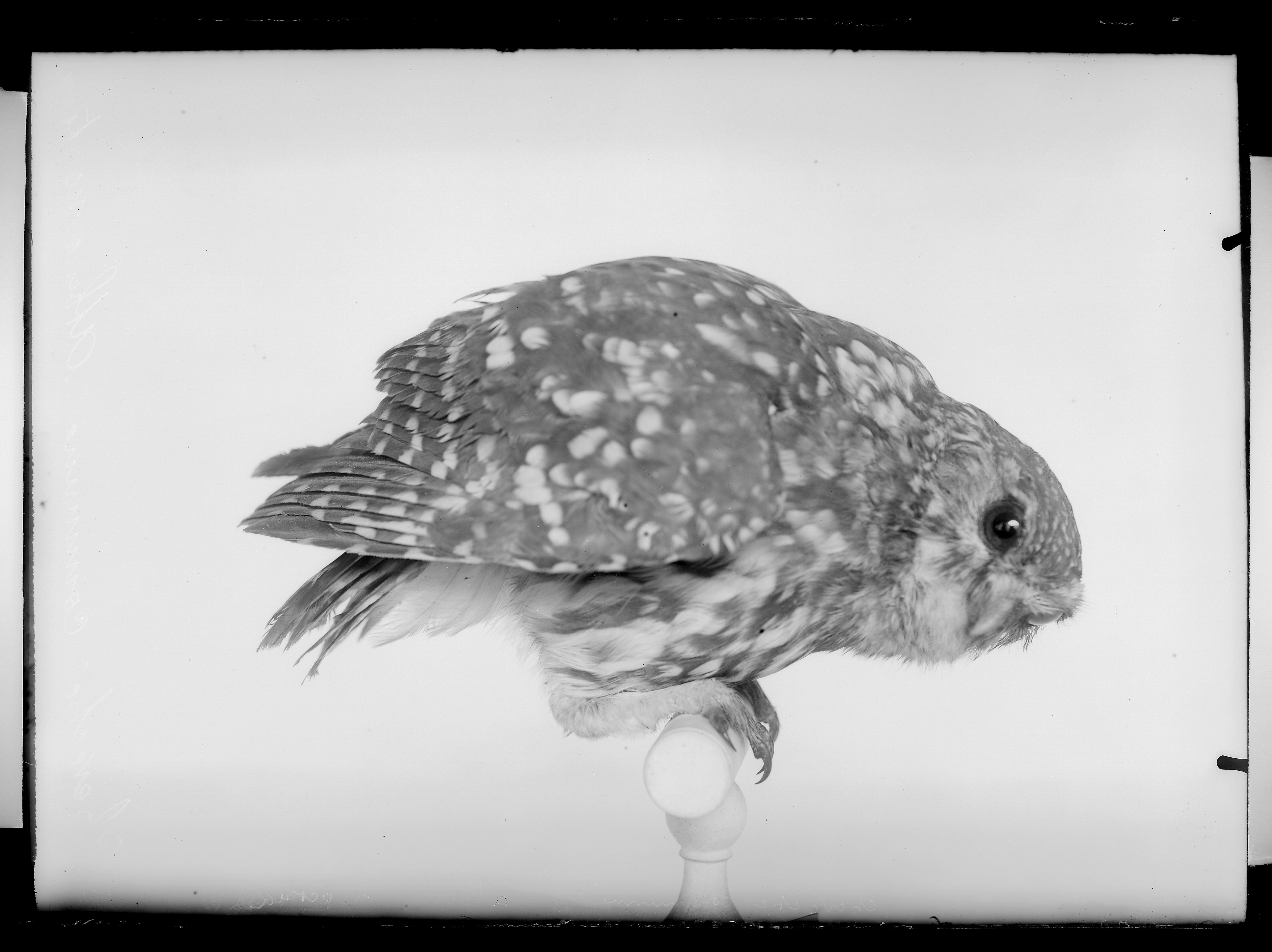 plaque négative au gélatino-bromure d'argent format 13x18cm. Sans inscription ni mention d'auteur.